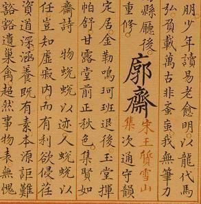 《永乐大典》“廓斋”条目